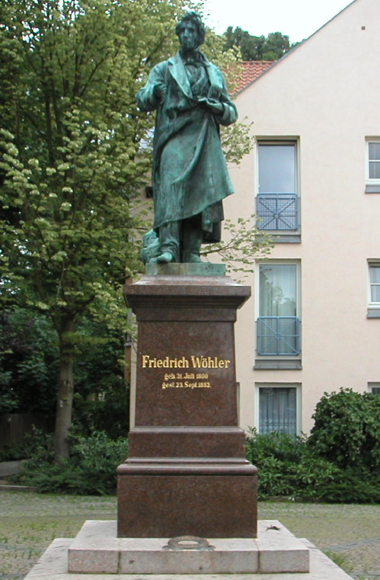 Friedrich-Wöhler-Denkmal in Göttingen/Deutschland, eingeweiht 1890. - Spendengelder von der DChG 1883 [1]